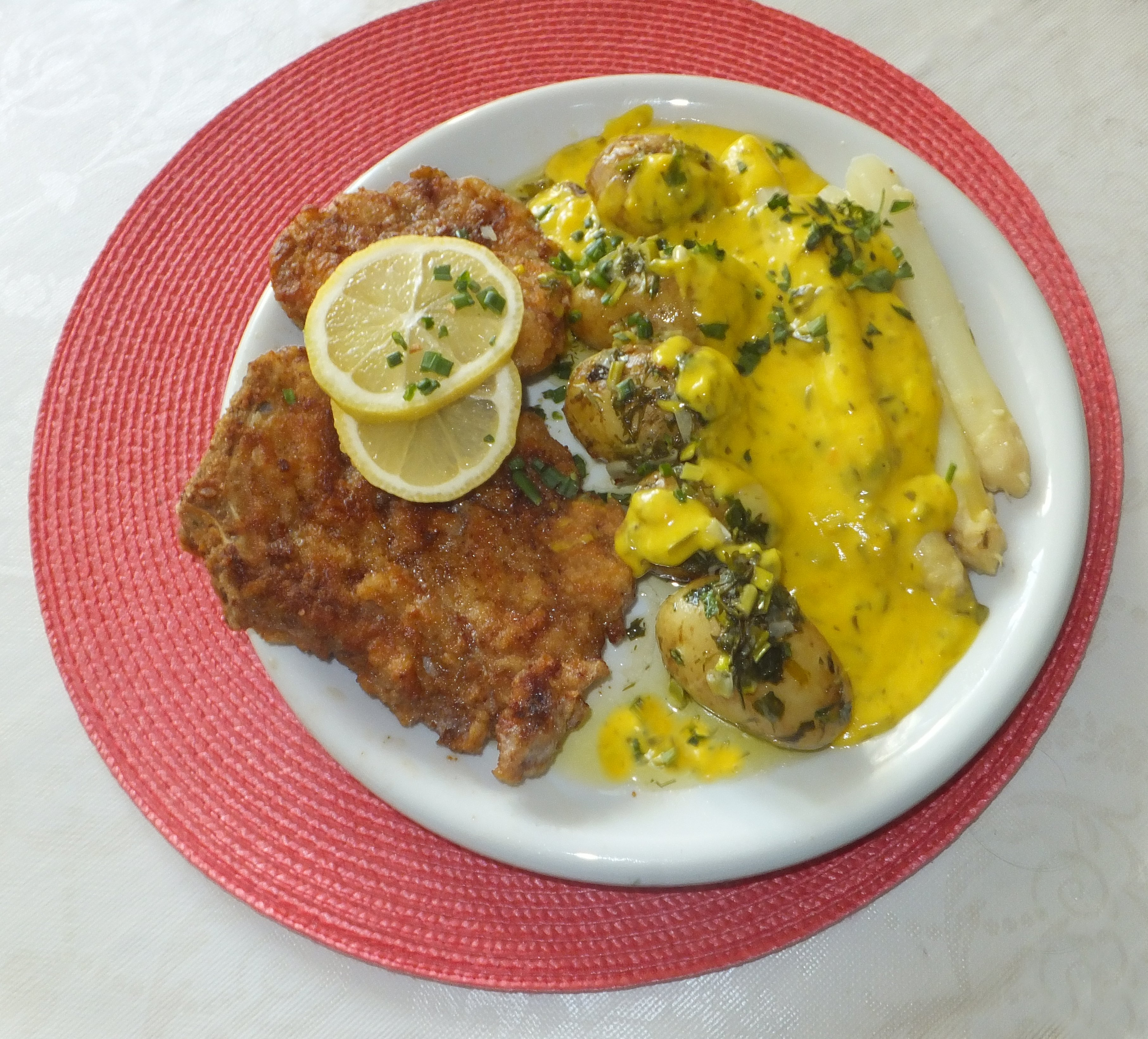 Kalbsschnitzelvariation, junge Kräuter-Backofen-Kartoffeln, Spargel und Sc. Béarnaise